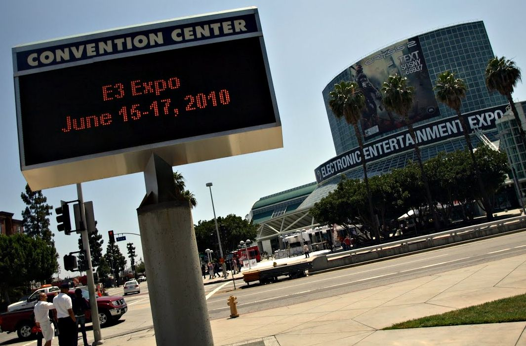 Entrada al South Hall del Convention Center en Los Angeles, durante la celebración de la feria de videojuegos E3, en junio del año 2010.